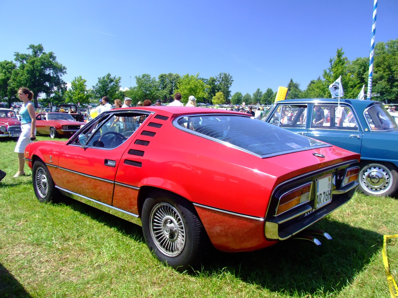 Quelle: selbst fotografiert, 06/2007 Fotograf: Späth Chr.